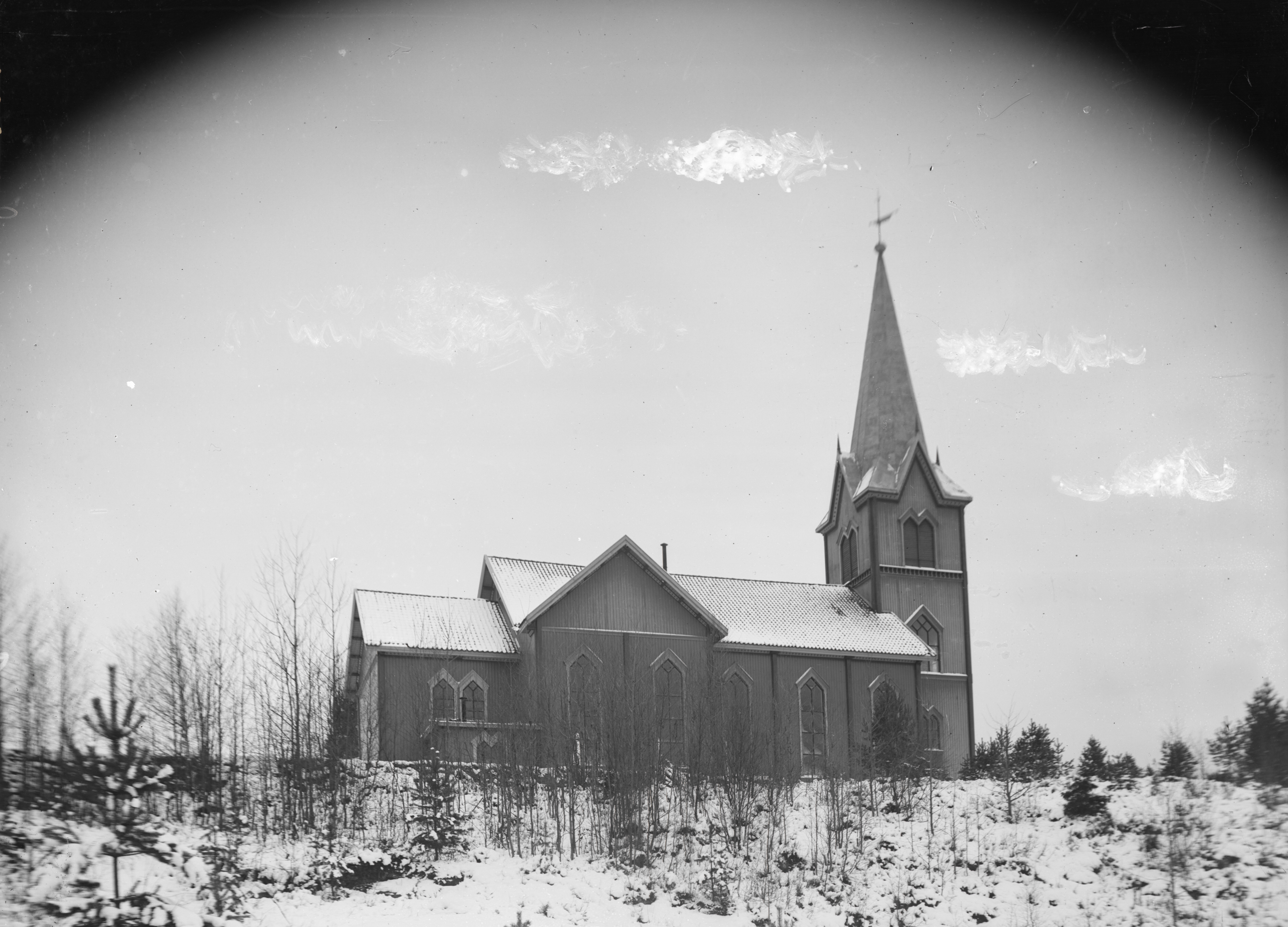 Evje kirke, Evje kyrkje i Evje og Hornnes, Aust-Agder